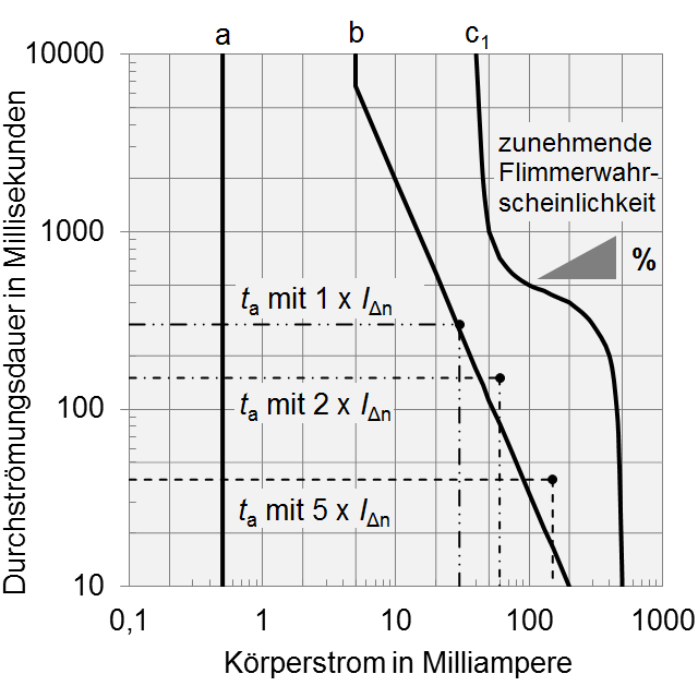 Zeit-/Stromstärke-Bereiche für Wechselströme aus IEC/TS 60479-1:2005 Bild 20 modifiert (zusätzliche RCD-Arbeitspunkte) a: Empfindungsschwelle b: Loslassschwelle c1: Flimmerschwelle (nicht dargestellt c2 und c3) zusätzlich drei Arbeitspunkte von RCDs mit maximalen Auslösezeiten abhängig vom Vielfachen des Bemessungsfehlerstromes (hier 30 mA)